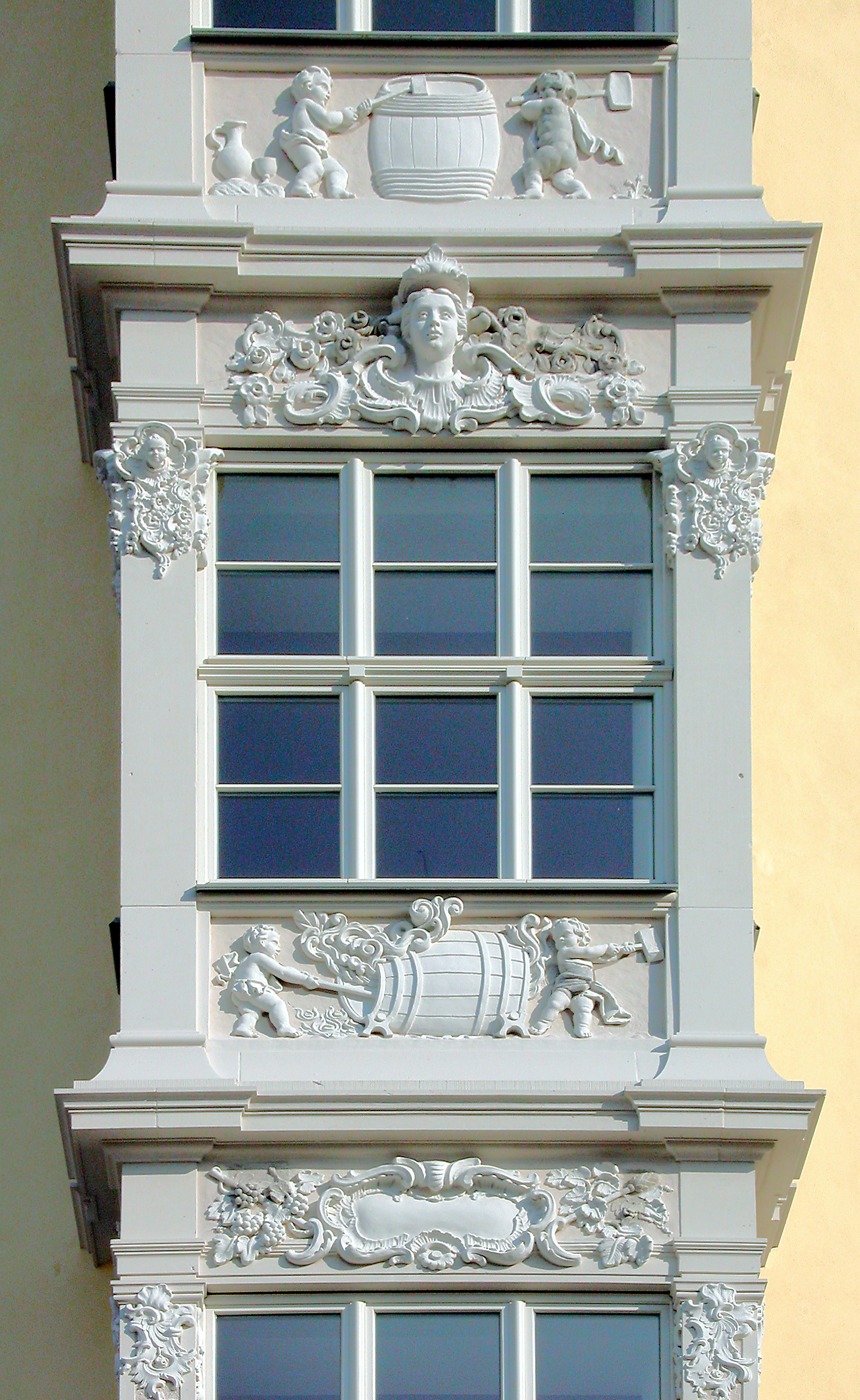 24.04.2009 01067 Dresden-Altstadt, Neumarktgebiet: Erker am "Köhlerschen Haus", Haus d. Weinhändlers Johann Köhler (1747-1749; wieder aufgebaut 2008), Frauenstr.14. Heute Teil der Heinrich-Schütz-Residenz. [DSCN36661.TIF]20090424075DR.JPG(c)Blobelt